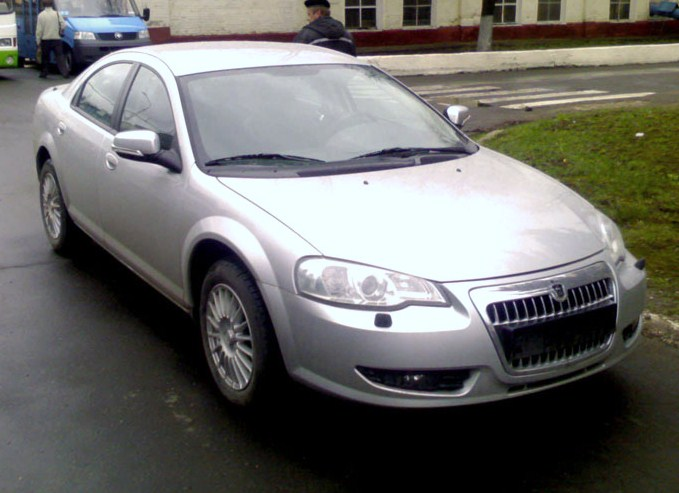 Волга Сайбер